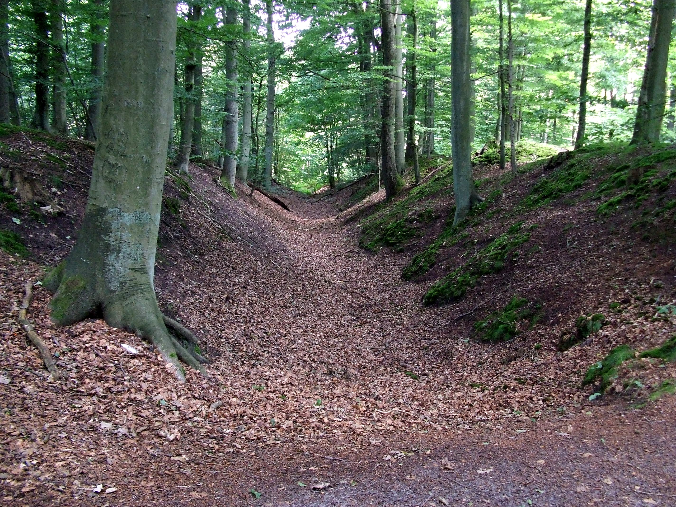 Schwedenschanzen im Wesloer Forst (Lauerholz)